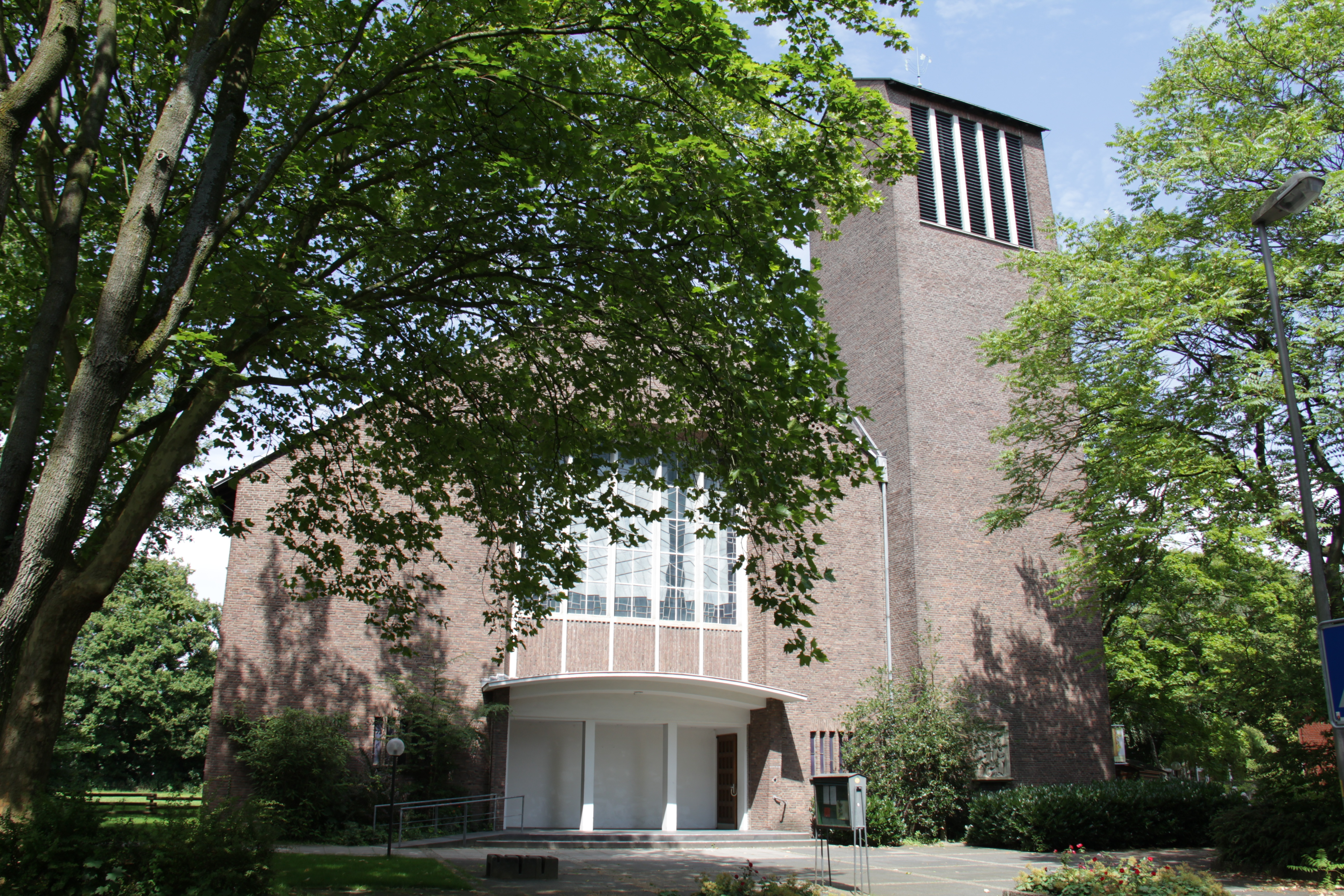 St.Theresiakirche in Münster/westfalen, Stadtteil Sentruper Höhe